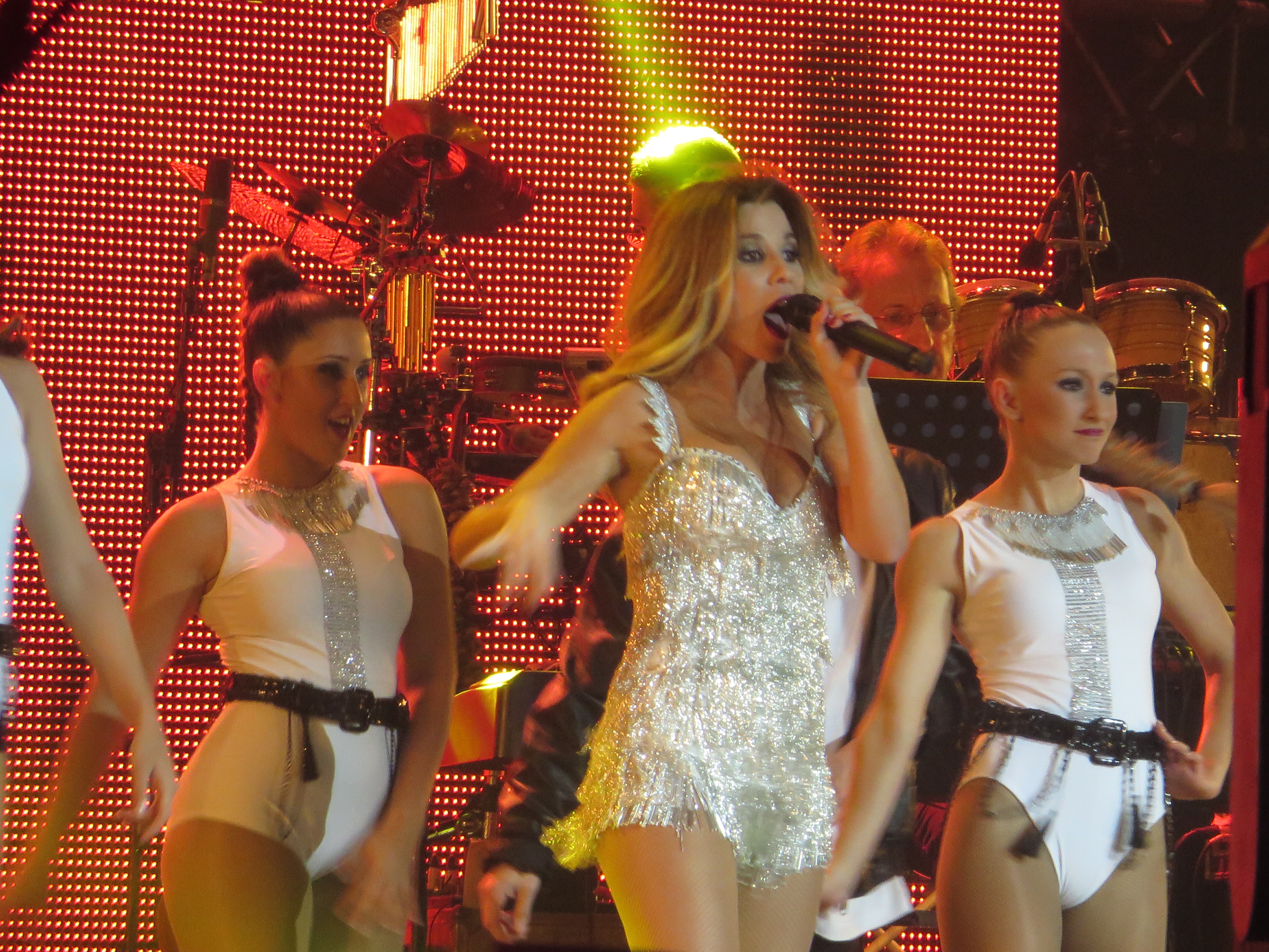 Actuación de Natalia en el concierto conmemorativo del 15 aniversario de OT en el Palau Sant Jordi de Barcelona (31-10-2016)